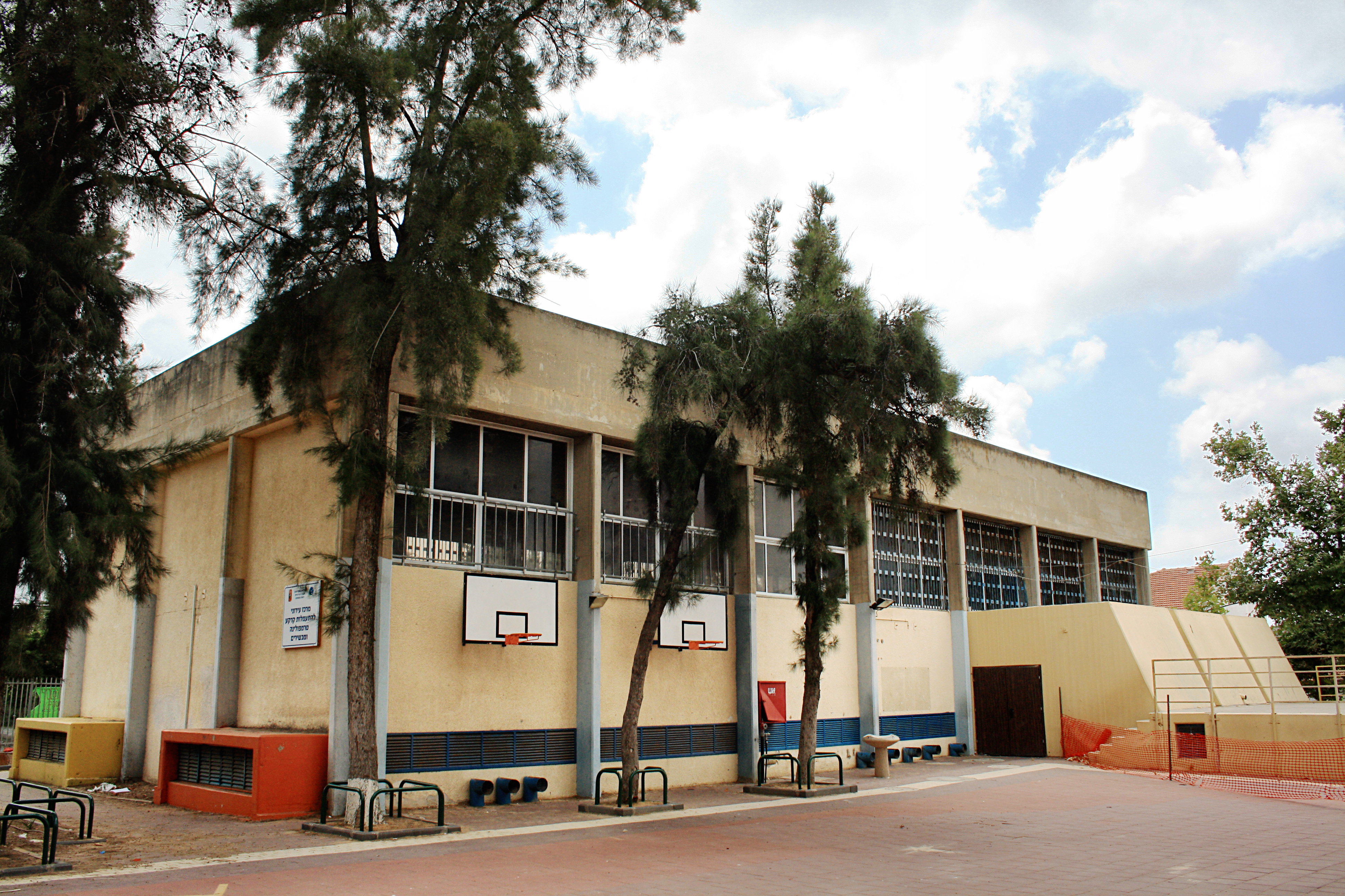 בית הספר "בארי", רחוב כצנלסון, ראשון לציון.